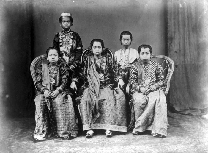 Negatief. Prinsessen van Tanette, Zuid-Sulawesi.